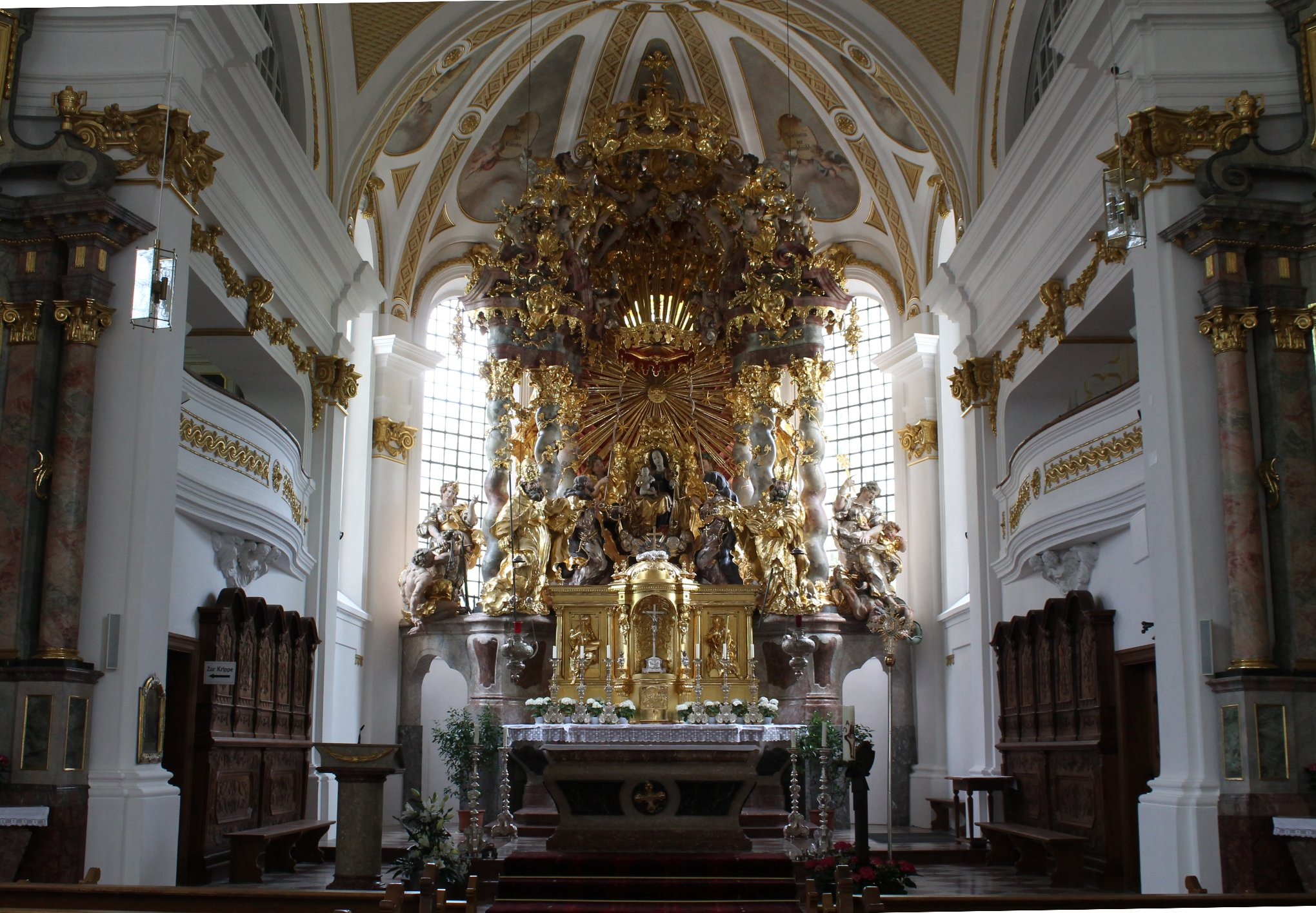 Altar der Wallfahrtskirche Maria Himmelfahrt in Dorfen